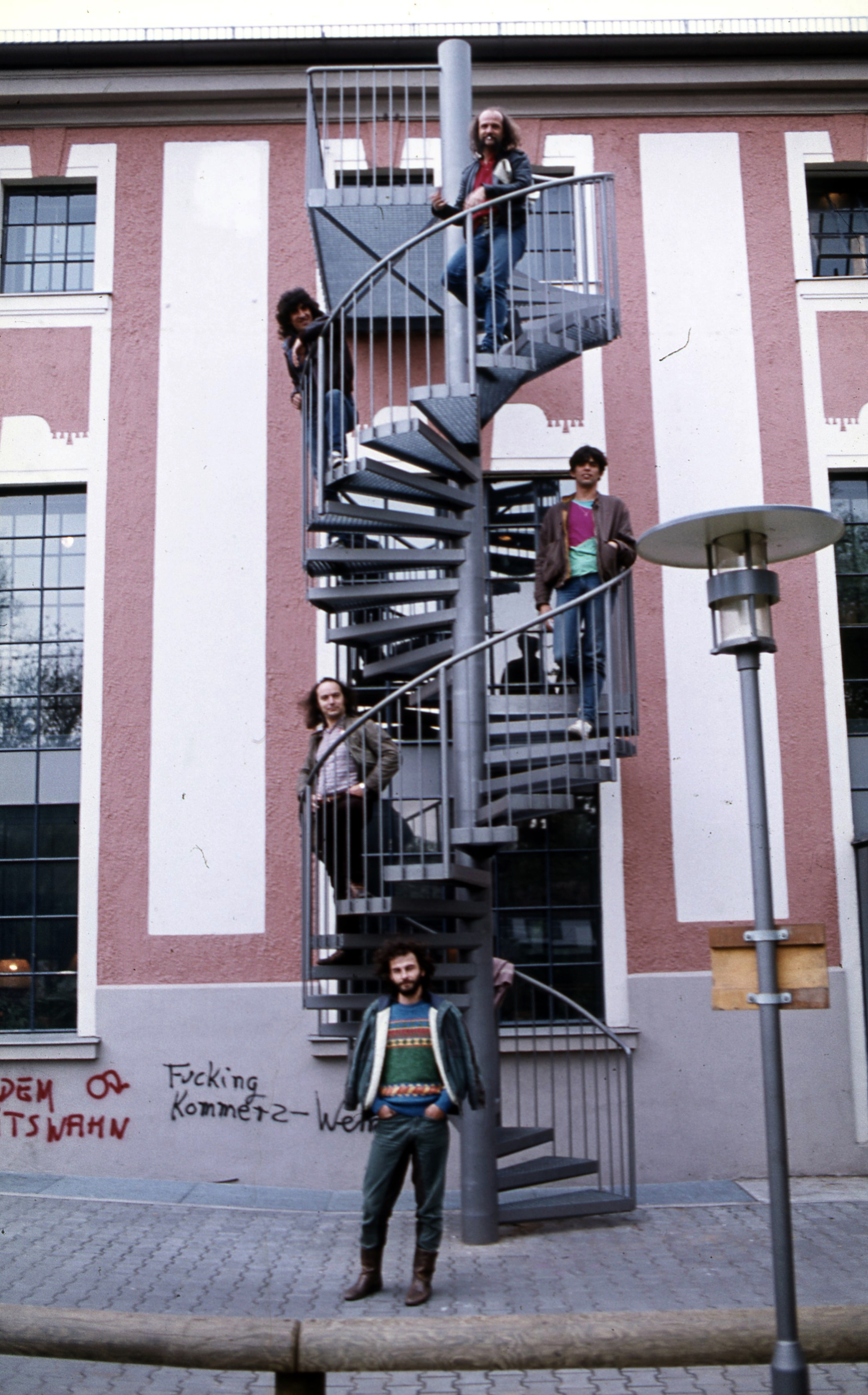 Karthago együttes. Fentről Gidófalvy Attila, Kocsándi Miklós, Takáts Tamás, Szigeti Ferenc, Kiss Zoltán Zéró. A felvétel az együttes nürnbergi turnéja alkalmával készült.